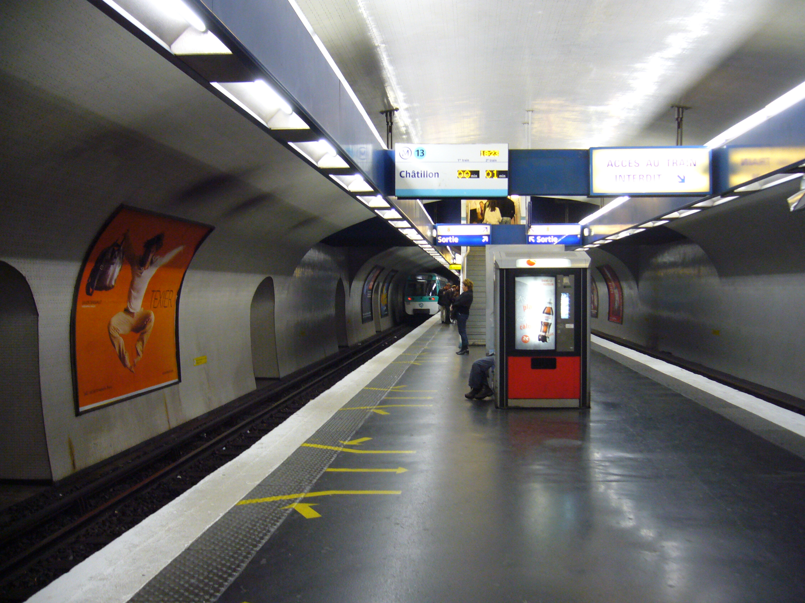 Vue de la station Invalides sur la ligne 13 du métro de Paris.